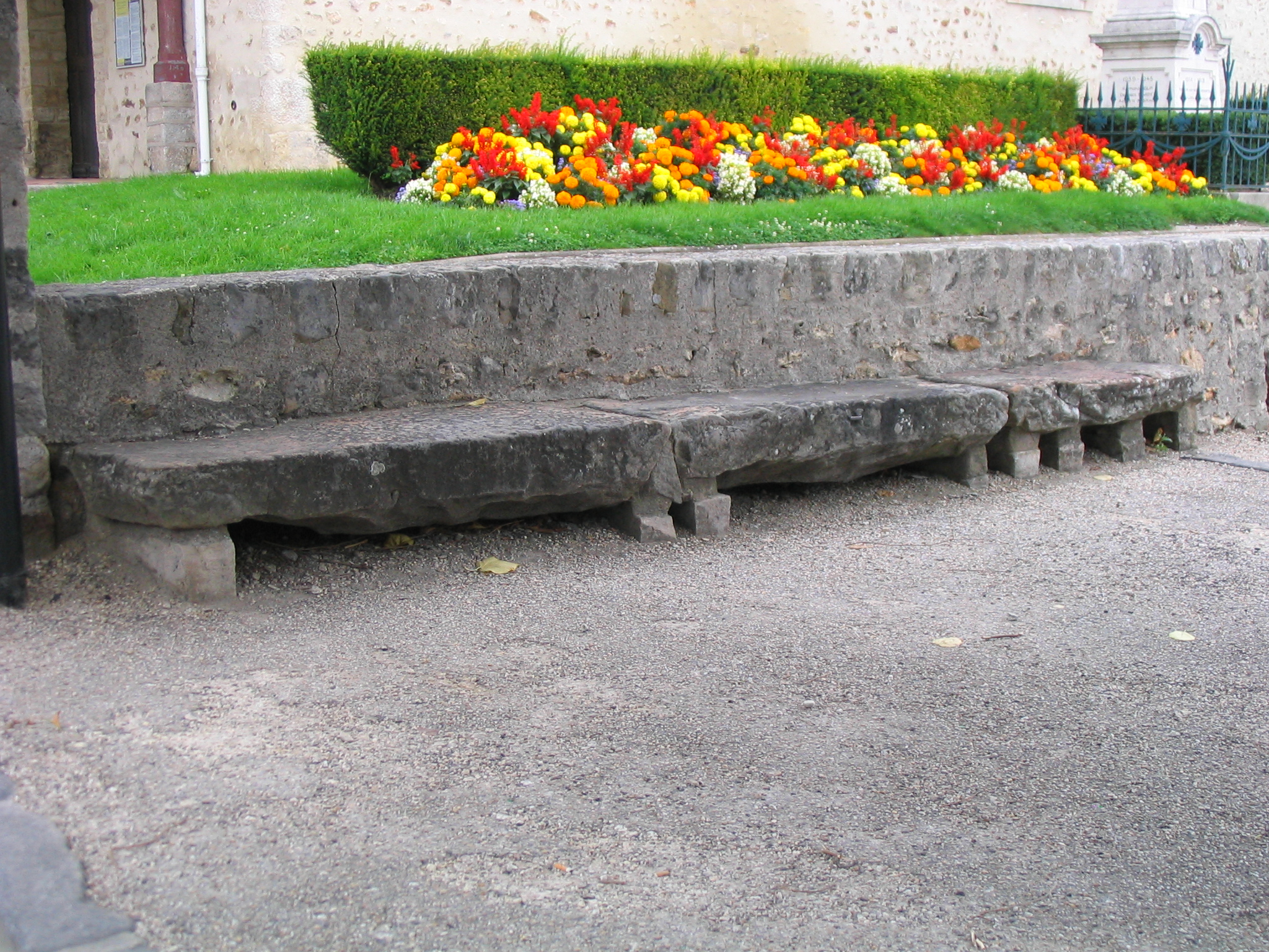 Un banc près de l'église Saint Germain, à Savigny-le-Temple. Il se compose de trois pierres tombales d'anciens templiers.